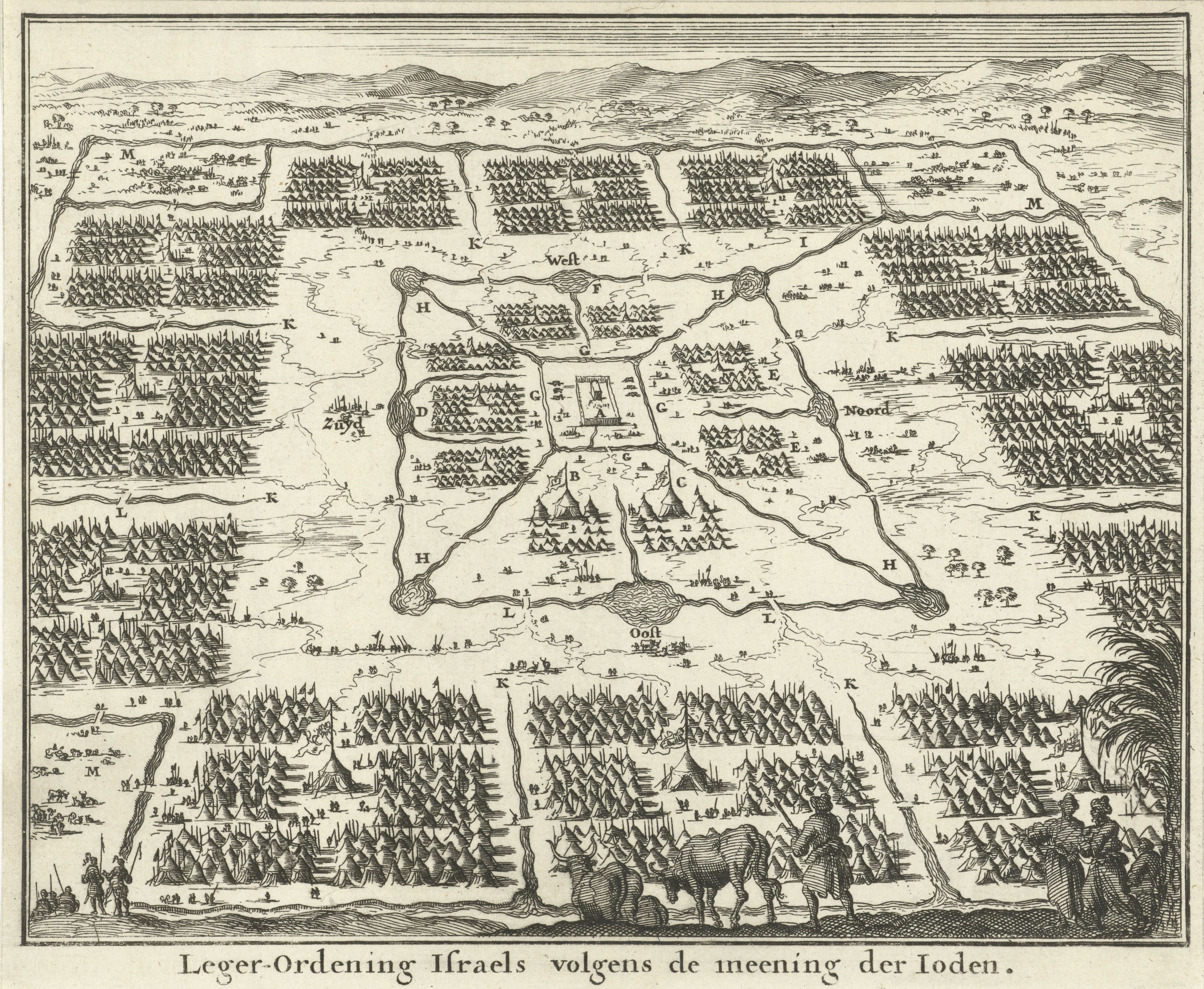 IdentificatieTitel(s): Tabernakel omringd door tentenkampen van de twaalf stammen van IsraëlLeger-Ordening Israels volgens de meening der Joden (titel op object)Objecttype: prent boekillustratie Objectnummer: RP-P-1896-A-19368-331Catalogusreferentie: Van Eeghen 461Opschriften / Merken: verzamelaarsmerk, verso, gestempeld: Lugt 2228VervaardigingVervaardiger: prentmaker: Jan Luykenuitgever: Willem GoereePlaats vervaardiging: AmsterdamDatering: 1683Fysieke kenmerken: etsMateriaal: papier Techniek: etsenAfmetingen: blad: h 142 mm × b 173 mmToelichtingIllustratie opgenomen in: Cunaeus, Petrus. De republyk der Hebreen, of gemeenebest der joden, 3 delen. Amsterdam: Wilhelmus Goeree, 1683, dl. 2, p. 508.OnderwerpWat: the twelve tribes of Israel (not in biblical context)tabernacle, 'mishkan' ~ Jewish religionVerwerving en rechtenVerwerving: aankoop jul-1896Copyright: Publiek domein